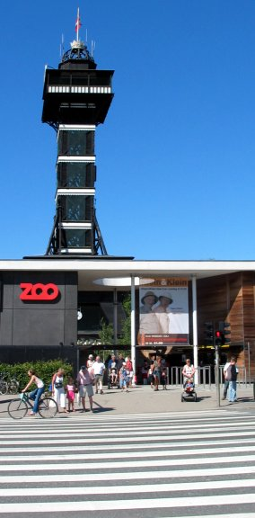 Zoologisk Have. København. Hovedindgang ©2005 Hans Jørn Storgaard Andersen